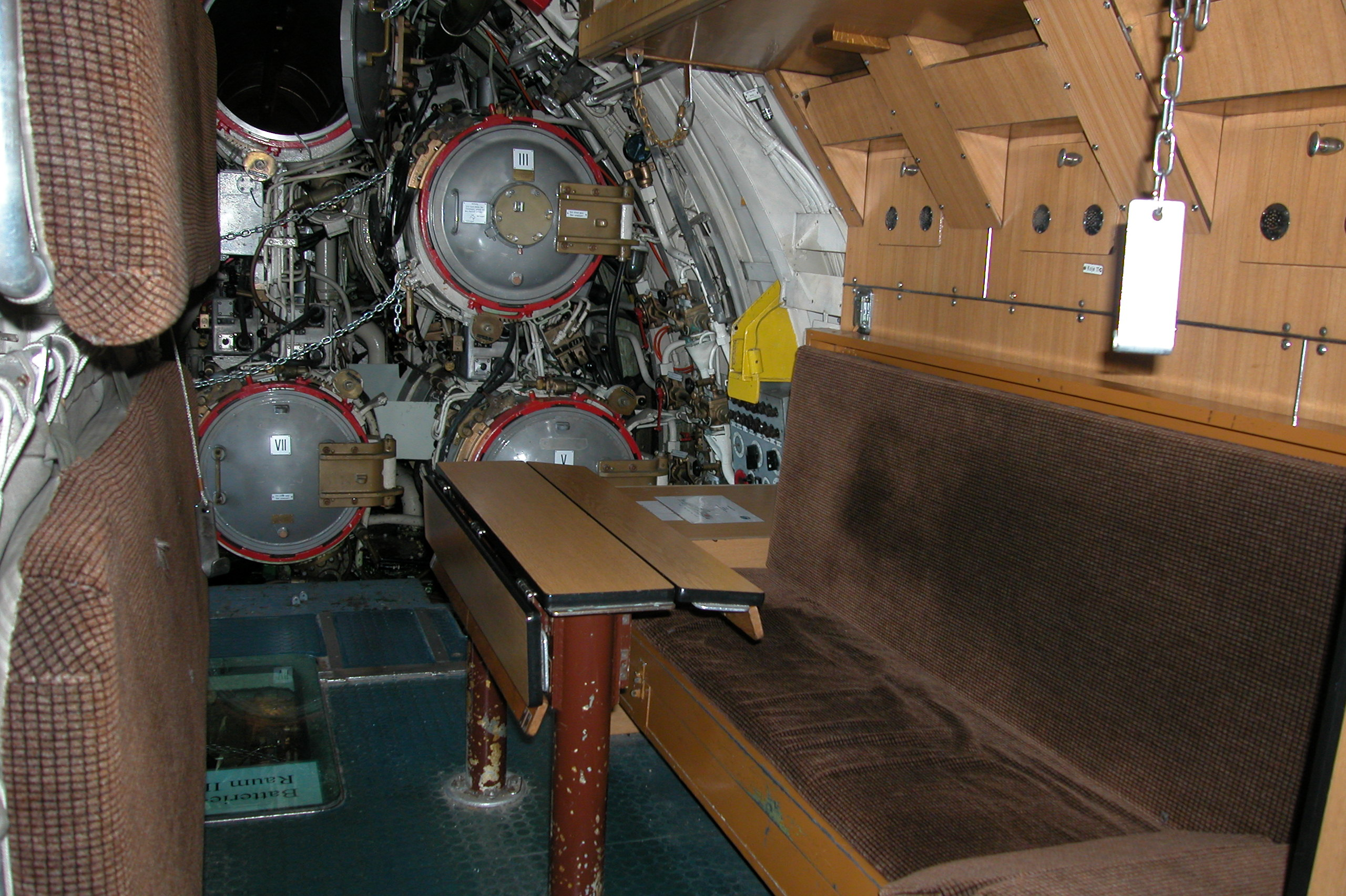 Torpedorohre im U-Boot "U11" (Museumsboot in Burgstaaken auf Fehmarn)